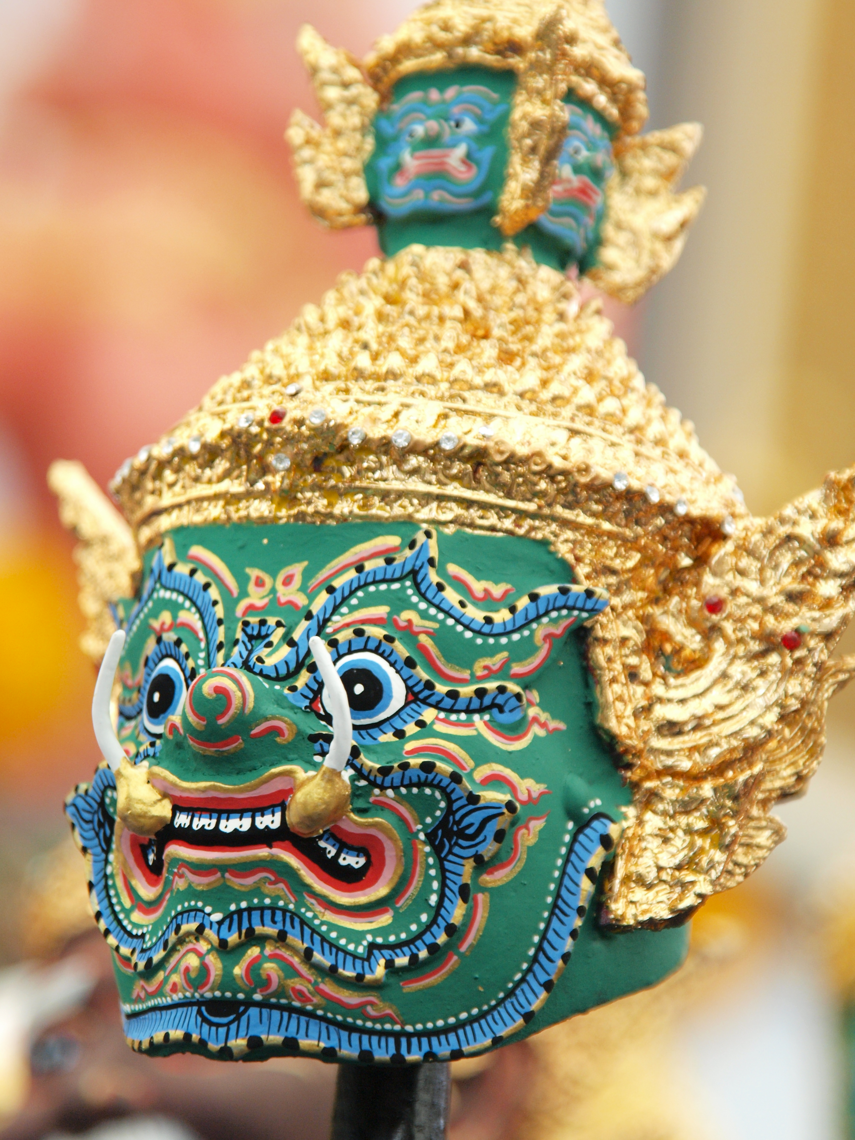 ภาพถ่ายหัวโขนฝ่ายยักษ์ หัวทศกัณฐ์ ถ่ายจากงาน "กรุงเทพฯ ถนนวัฒนธรรม" ของดีเขตบางพลัด ระหว่างวันที่ 1-5 กันยายน 2553